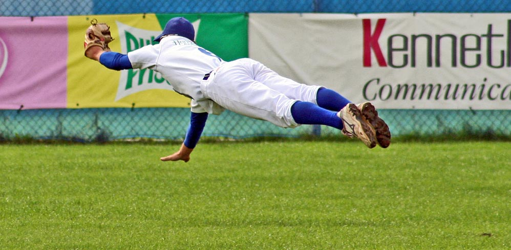 In eigen beheer geproduceerde foto van Martijn Meeuwis tijdens HCAW-Neptunus, 24-8-2006, genomen met Canon EOS 350D Digitale Spiegelreflexcamera met telelens.